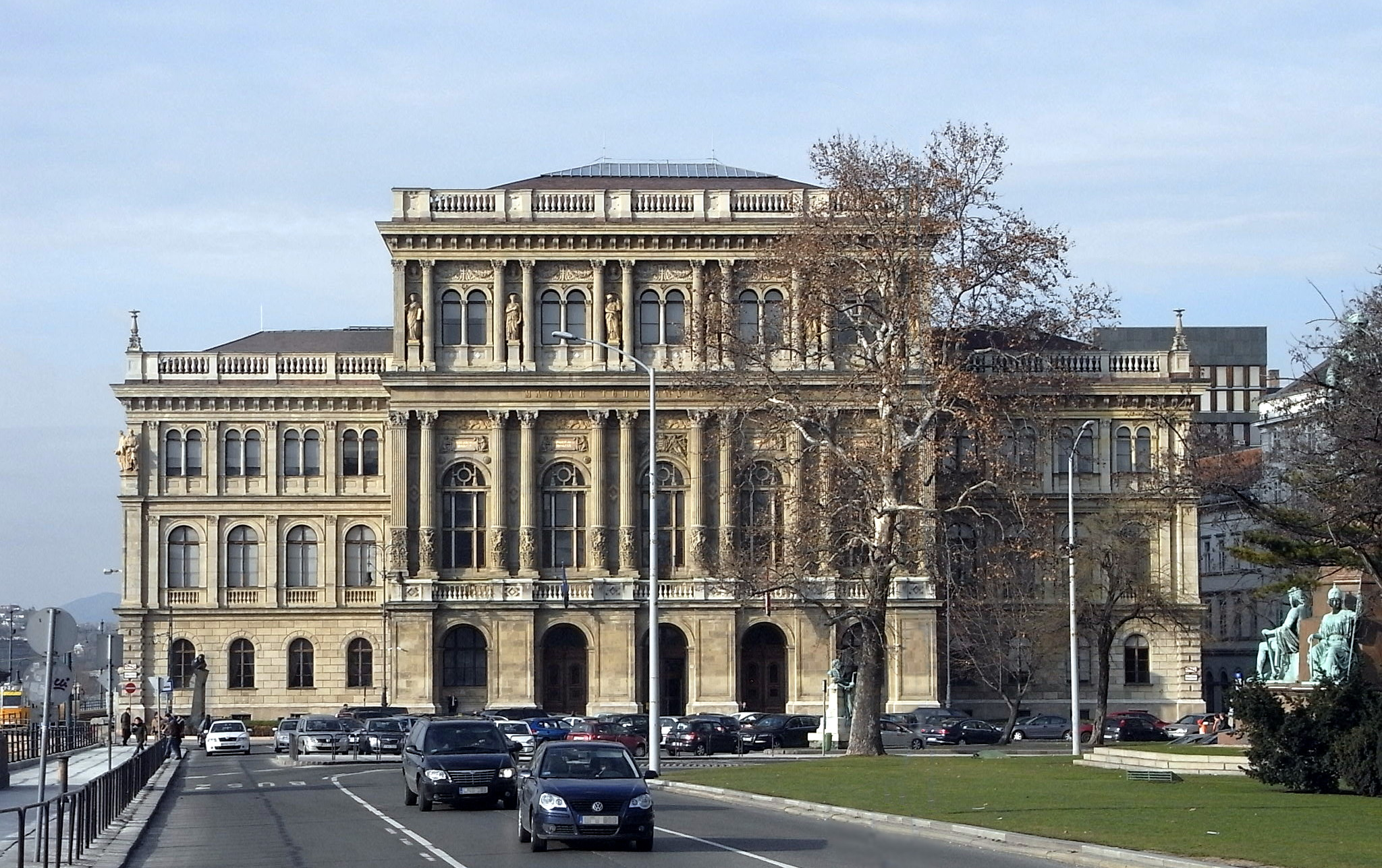 Budapest, Sitz der Ungarischen Akademie der Wissenschaften